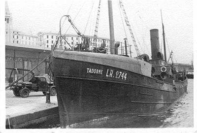 אוניית המעפילים נחשון